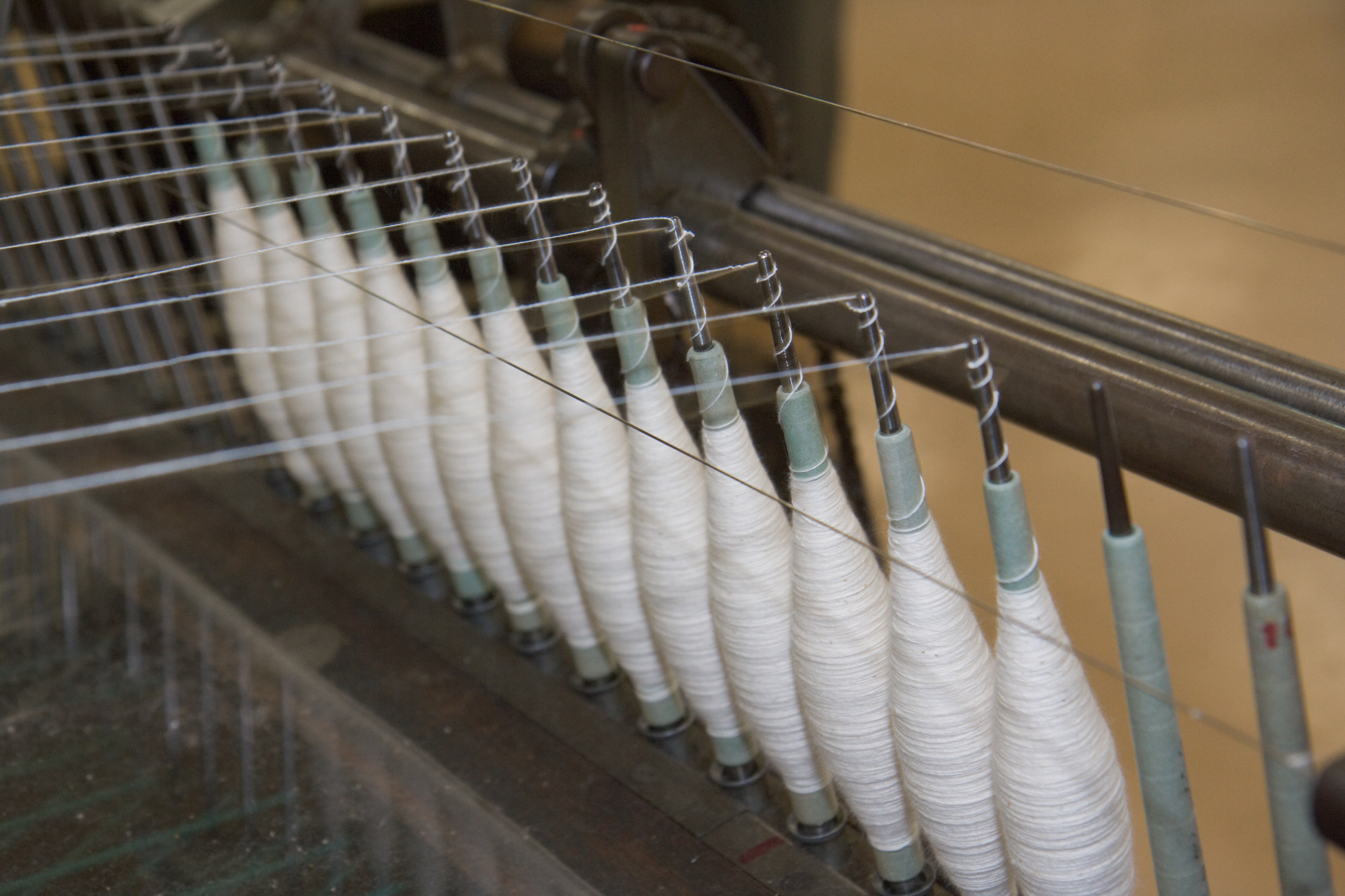 Selfaktorspinnmaschine mit fast ganz eingerücktem Wagen